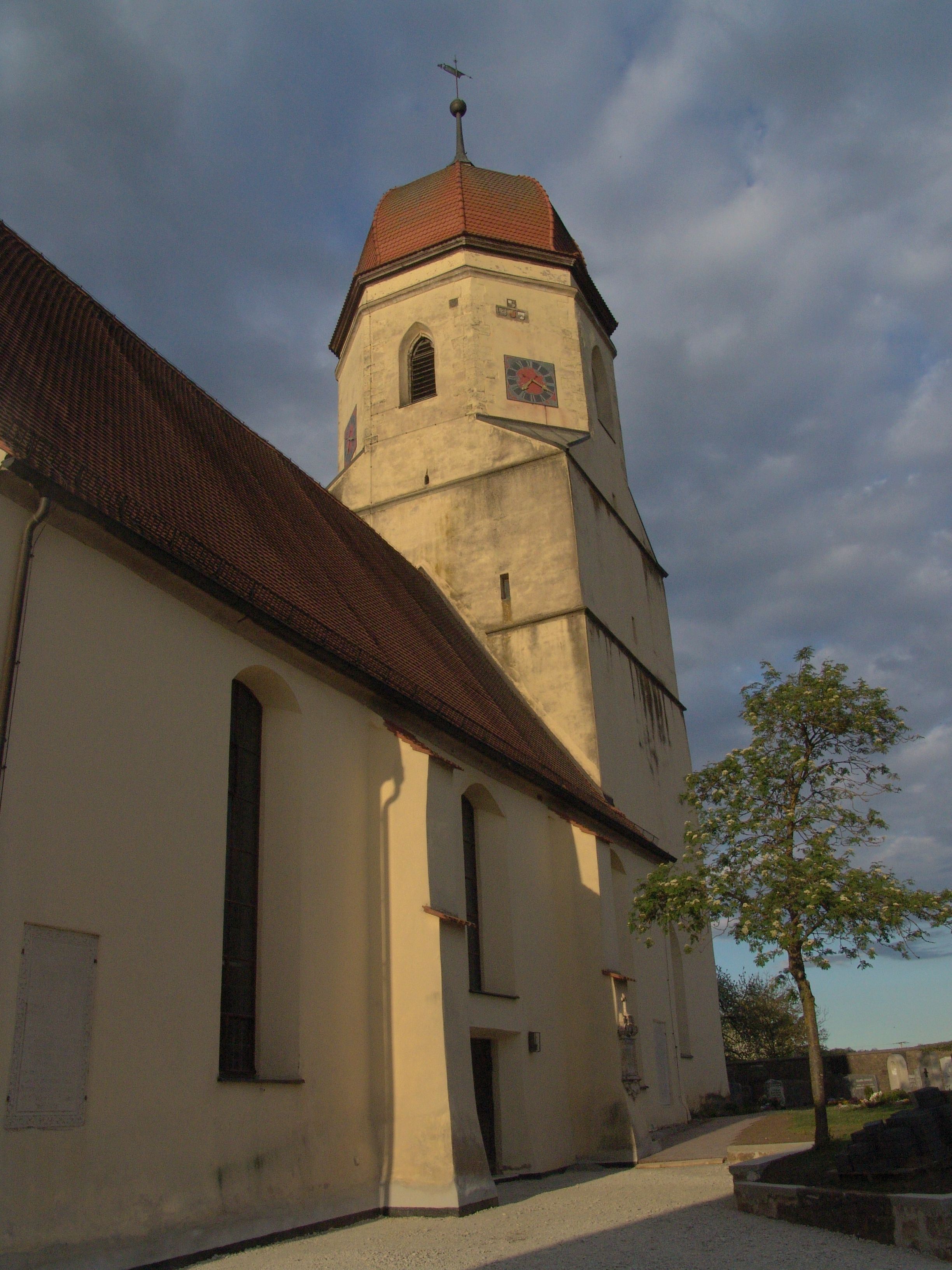 evang.-luth. Kirche Heilig Kreuz in Geilsheim